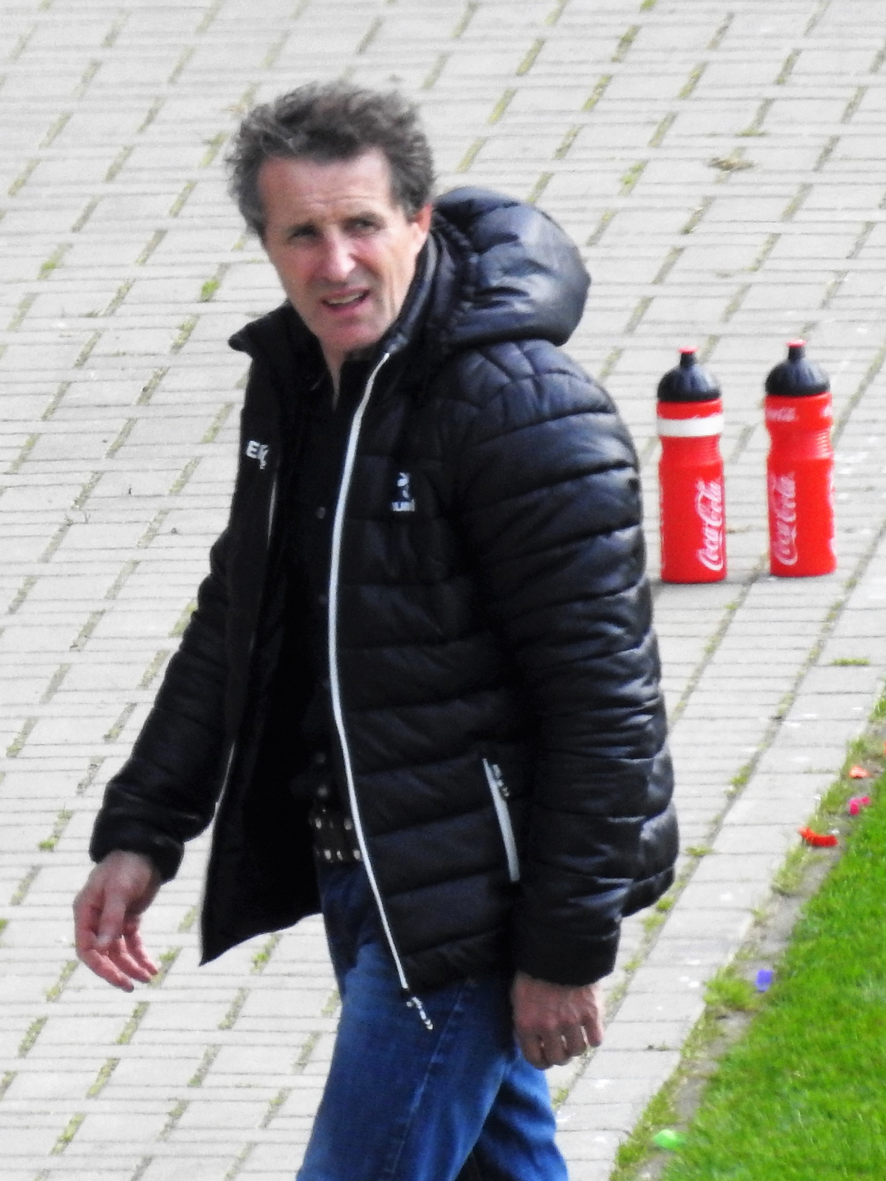 Janos Radoki Trainer SpVgg Greuther Fürth 2017